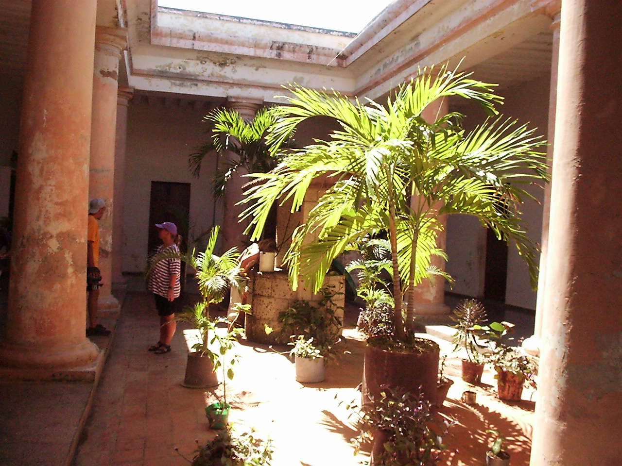 Atrium Innenhof, Wetterstation Cabo Lucretia, Kuba.